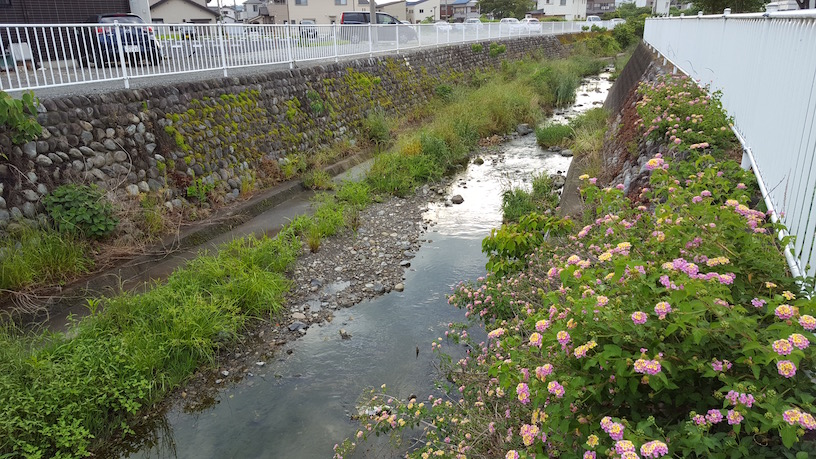 草薙川下流（清水区楠新田）